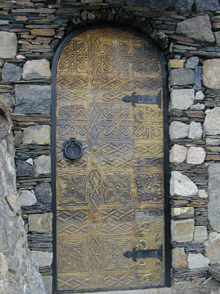 Door in Georgia